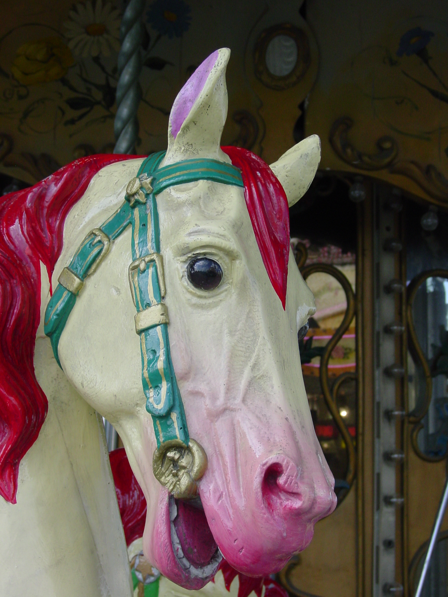 Cheval de bois d'un manège parisien